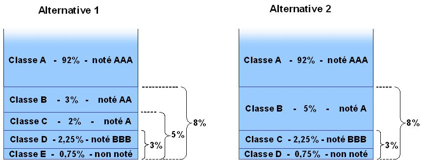 Description: Alternative de tranchage opération de titrisation Source: Bradypus Licence: Bradypus